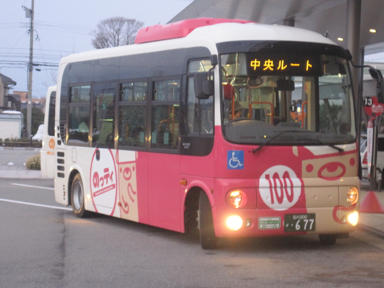 のっティ中央ルートで使用される日野ポンチョ（2代目）